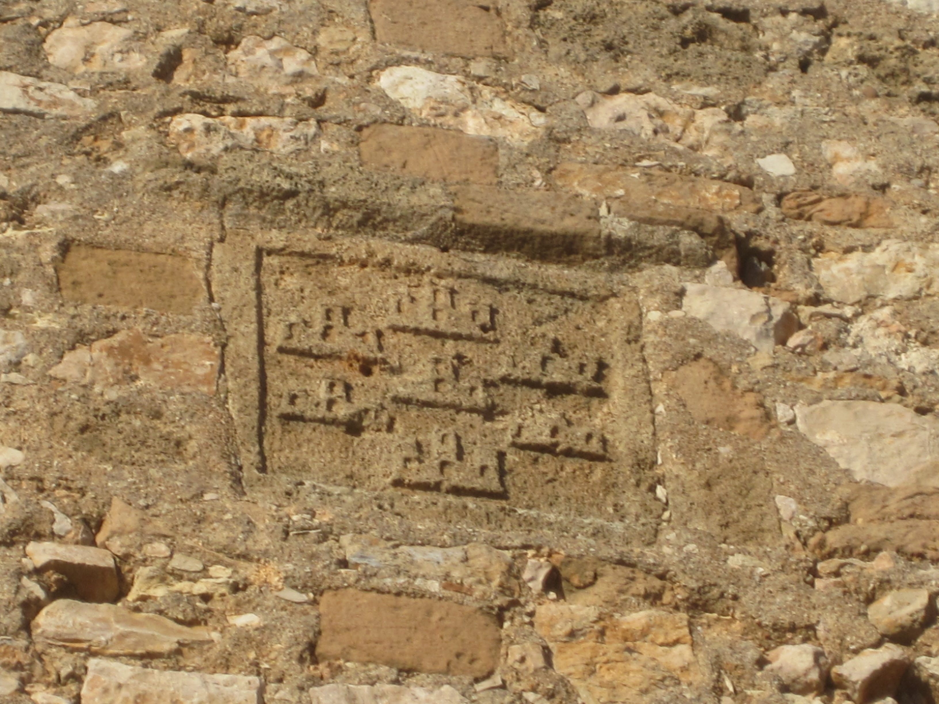 El escudo del pueblo de Sisamon.